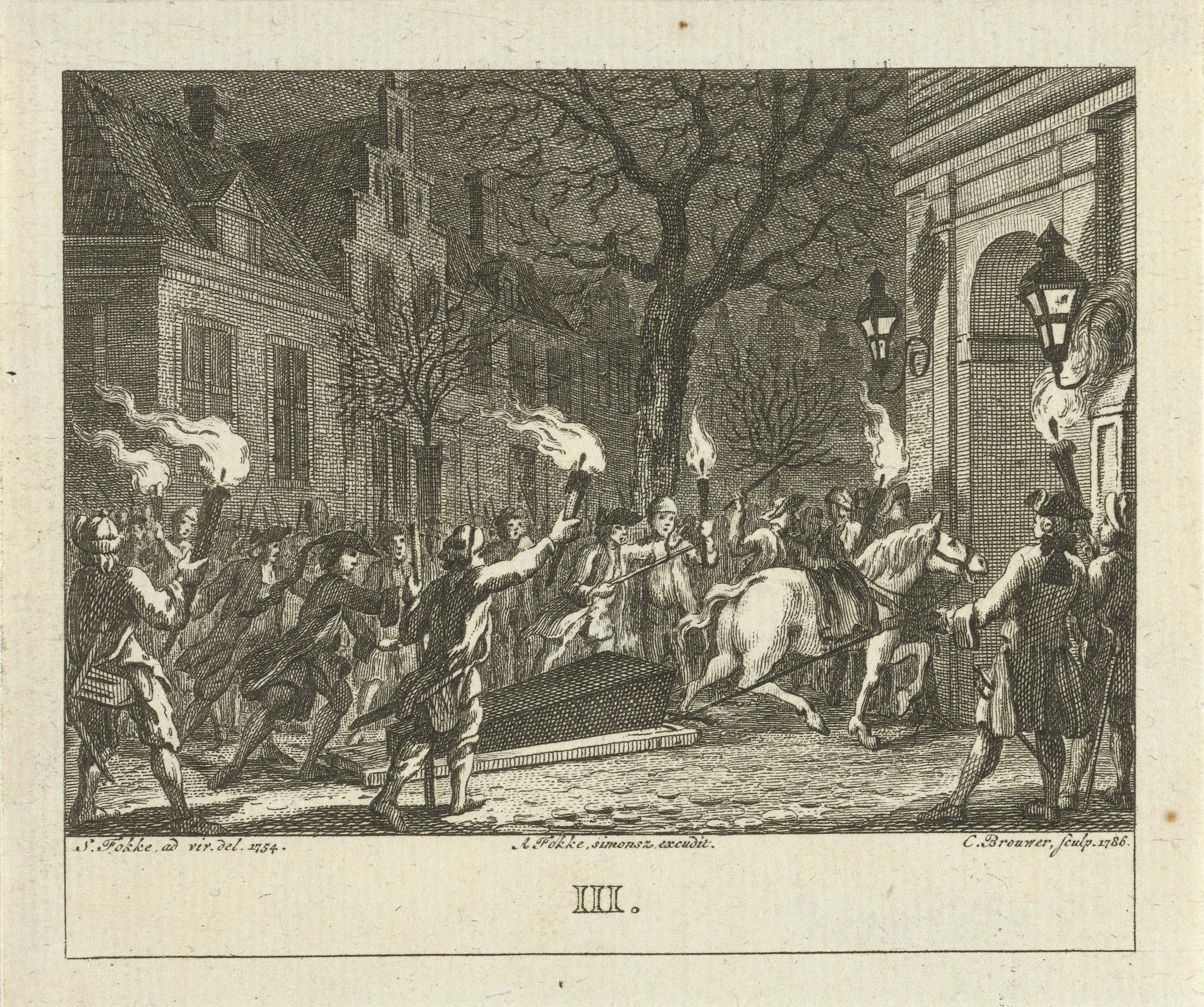 Begrafenis Daniel Raap, voormalig Doelistenleider, in 1754